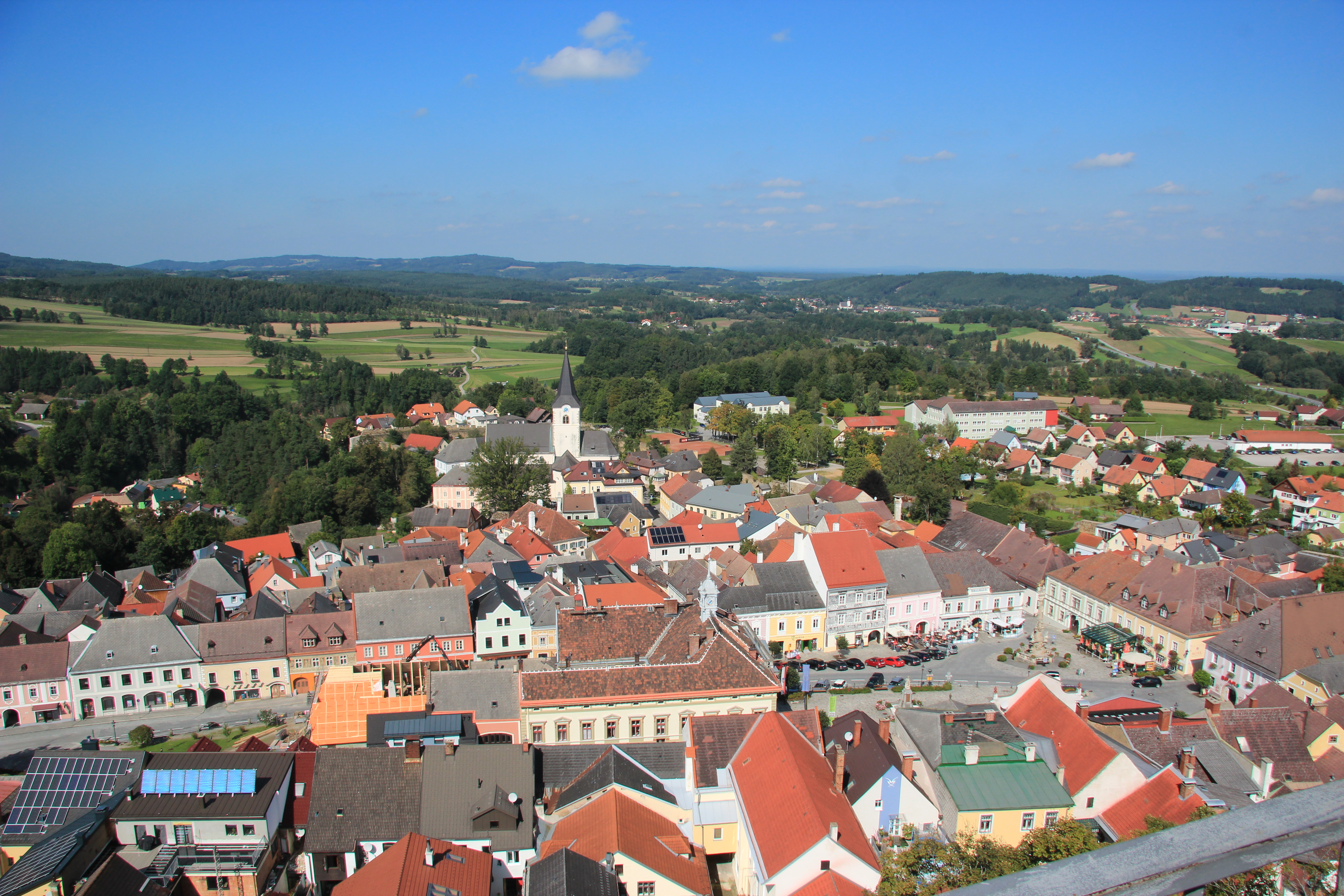 Schloss Weitra in Weitra, Waldviertel, Niederösterreich